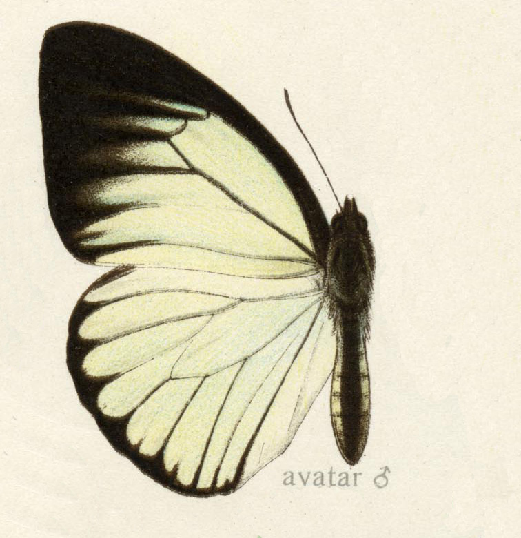 Pareronia avatar